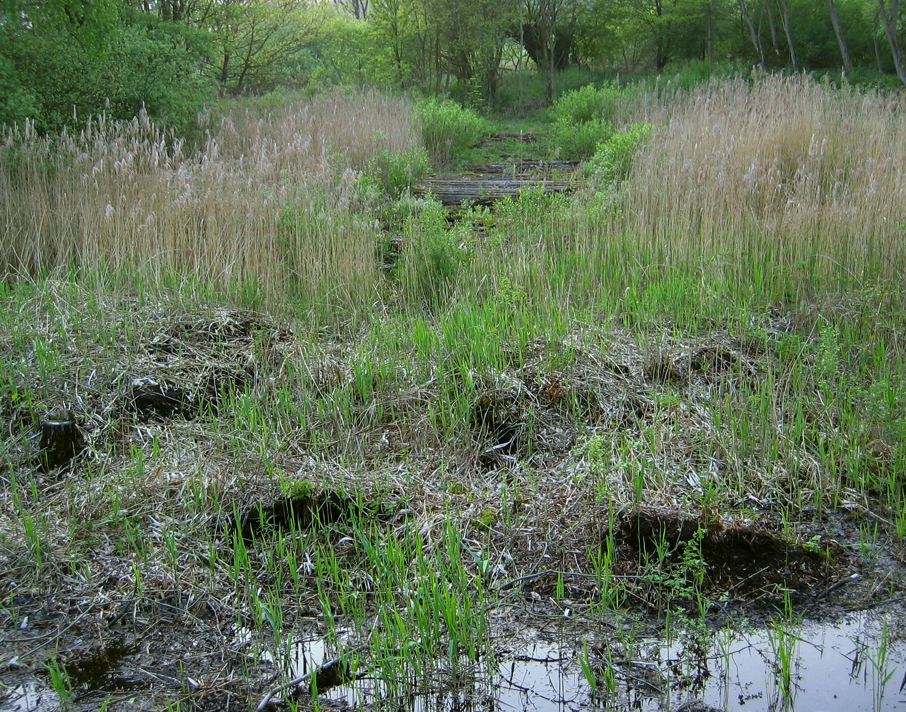 Alter (neuzeitlicher) Bohlenweg zwischen zwei mit Schilf (Phragmites australis) bestandenen und verbuschenden Torflagern im Naturschutzgebiet Satzer Moor, Bad Driburg, Deutschland.